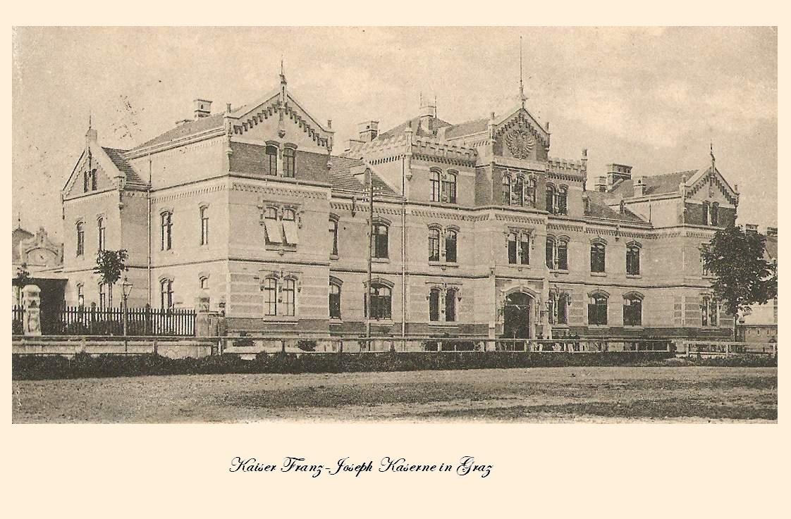 Kaiser Franz Joseph Kaserne in Graz